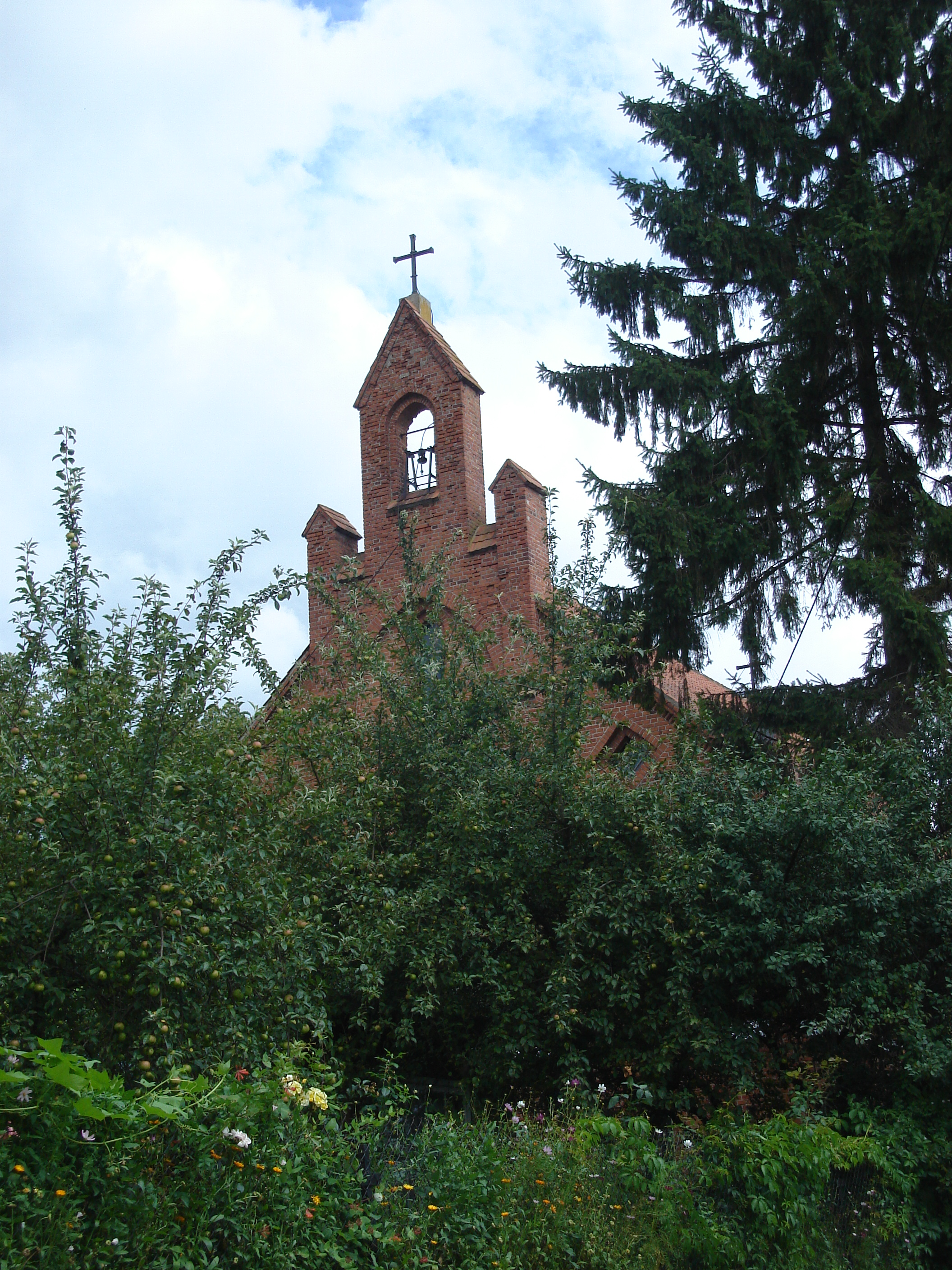 Kościół pw. Podwyższenia Krzyża Świętego w Ukcie